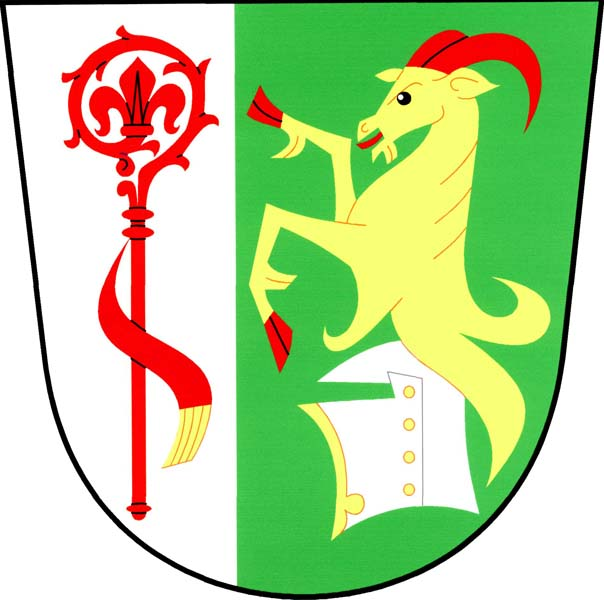 Znak obce Dolní Stakory